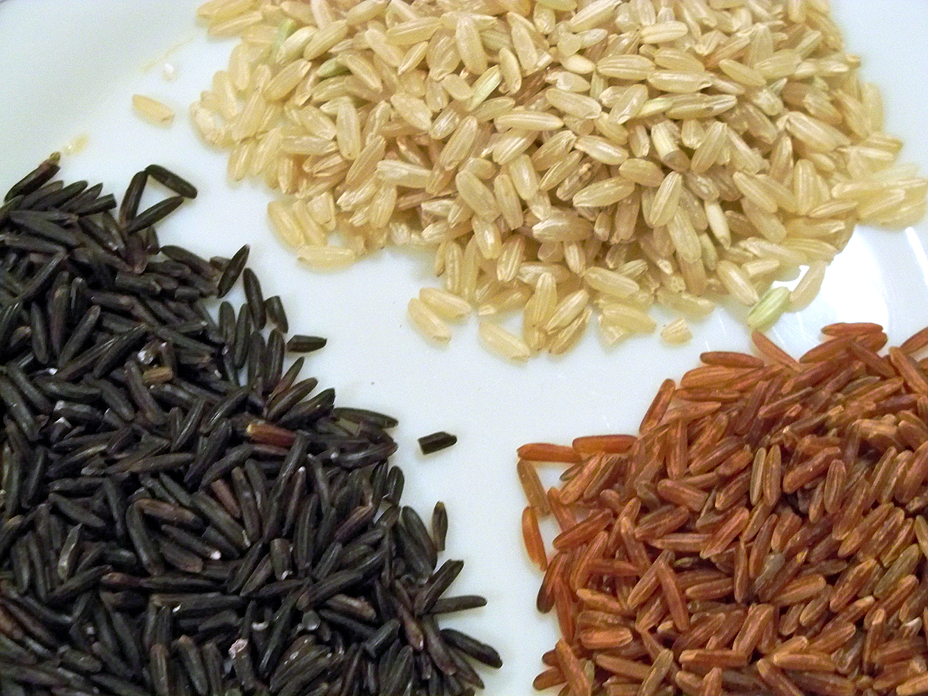 riz de Camargue